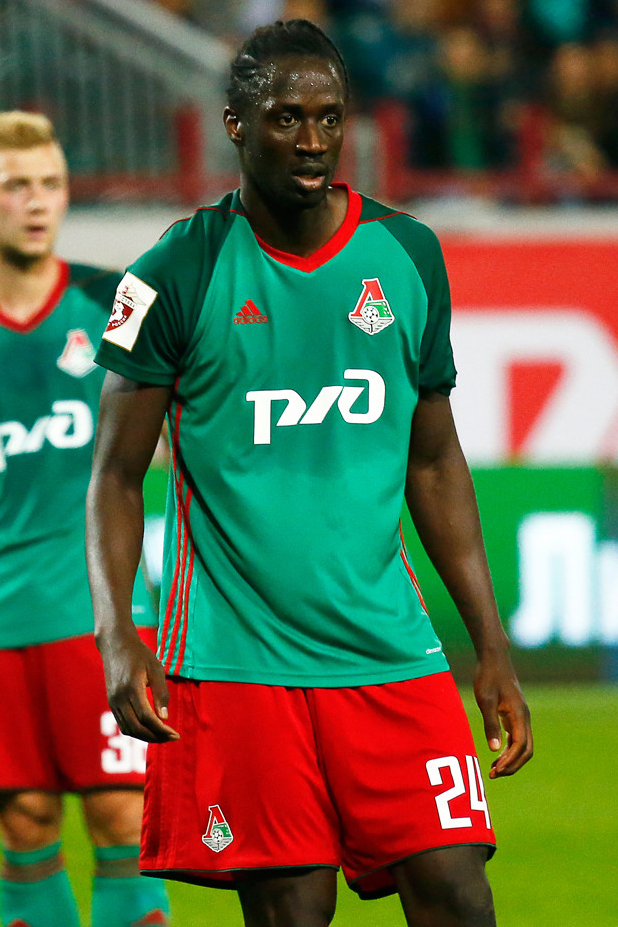 «Локомотив» - «Амкар»